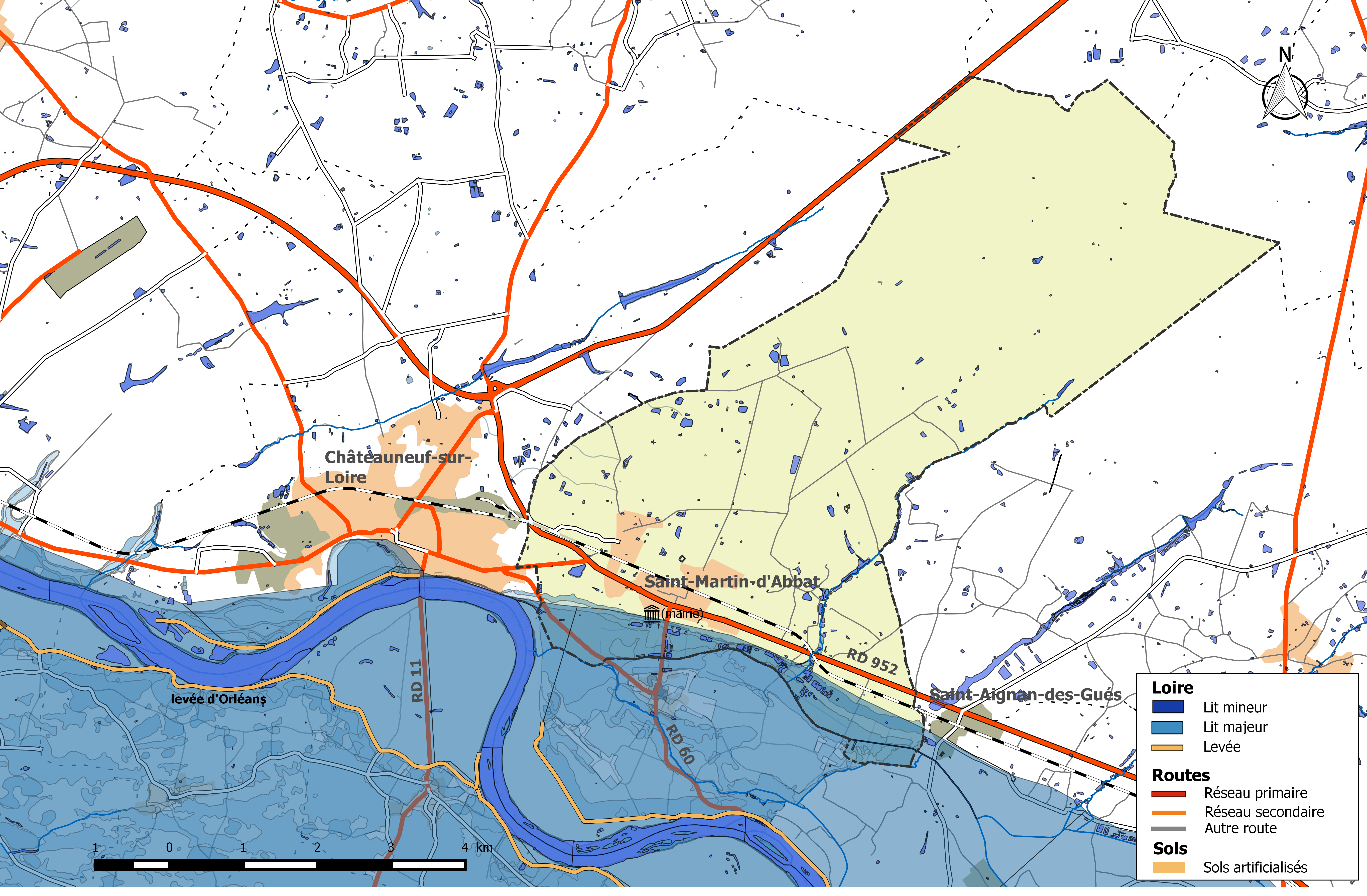 Zone inondable et réseaux hydrographique et routier de la commune de Saint-Martin-d'Abbat.